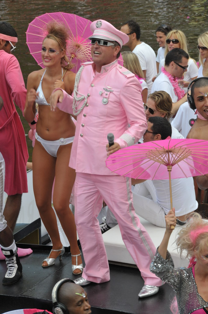 Zanger Gordon tijdens Gay Pride 2008